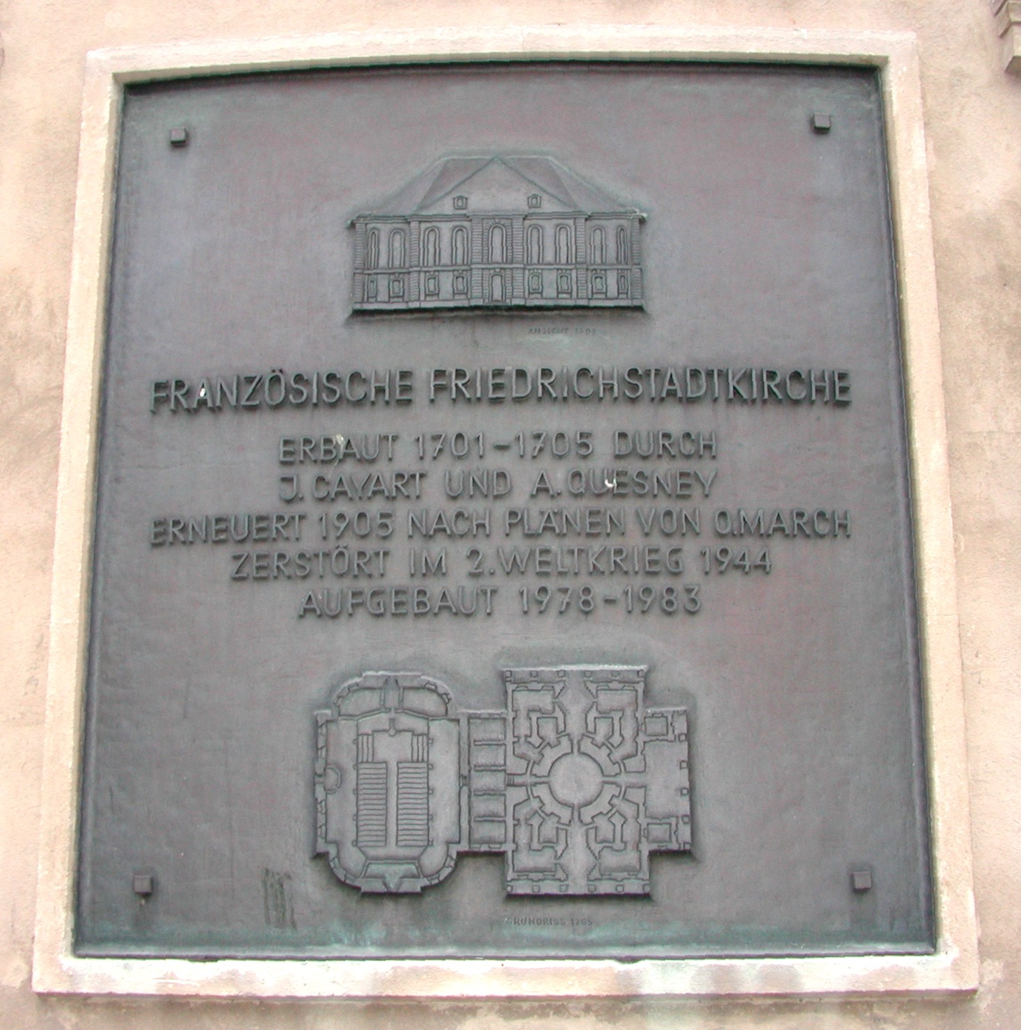 Die Informationstafel an der Französischen Friedrichstadtkirche